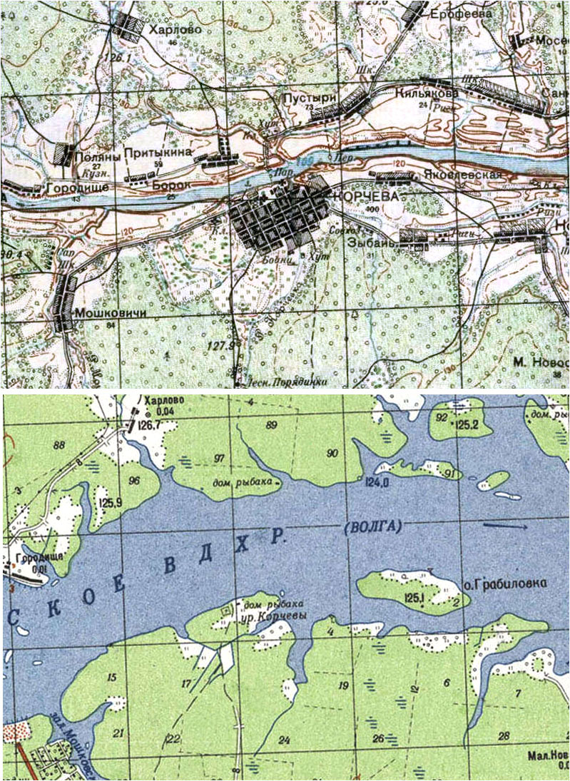 Корчева на карте 1925 года и на современной карте